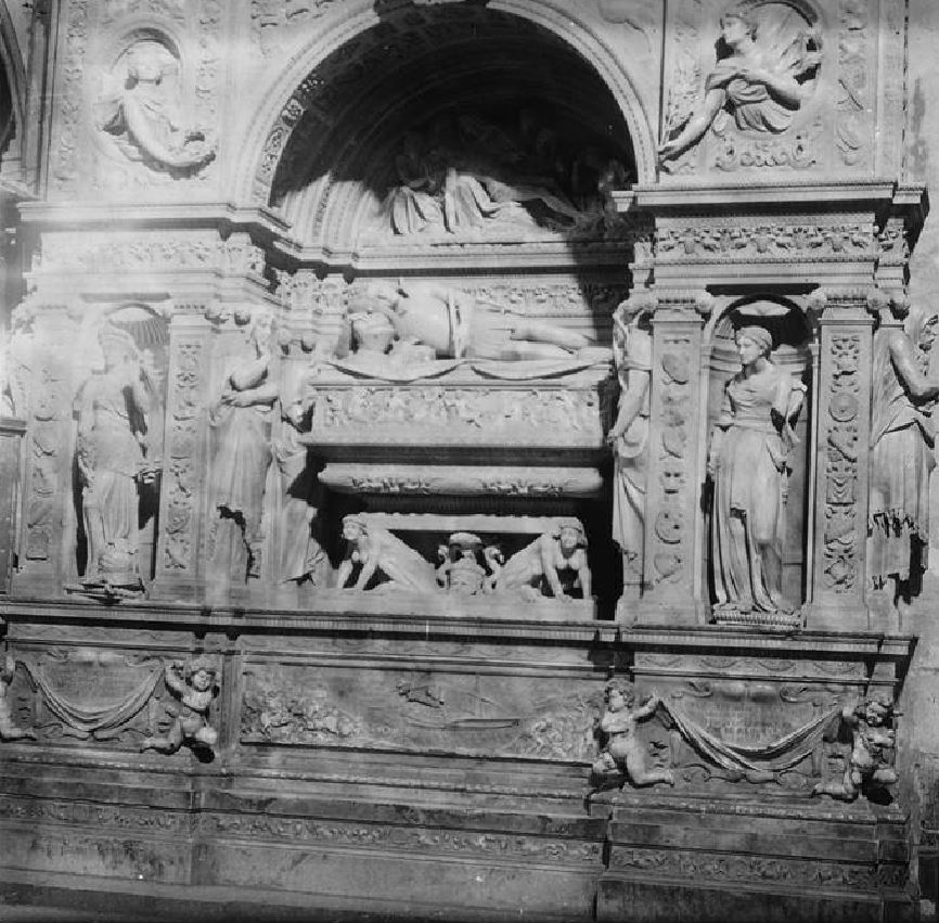 Mausoleu de Ramon III de Cardona-Anglesola al Convent de Sant Bartomeu de Bellpuig. Josep Salvany i Blanch (1912)